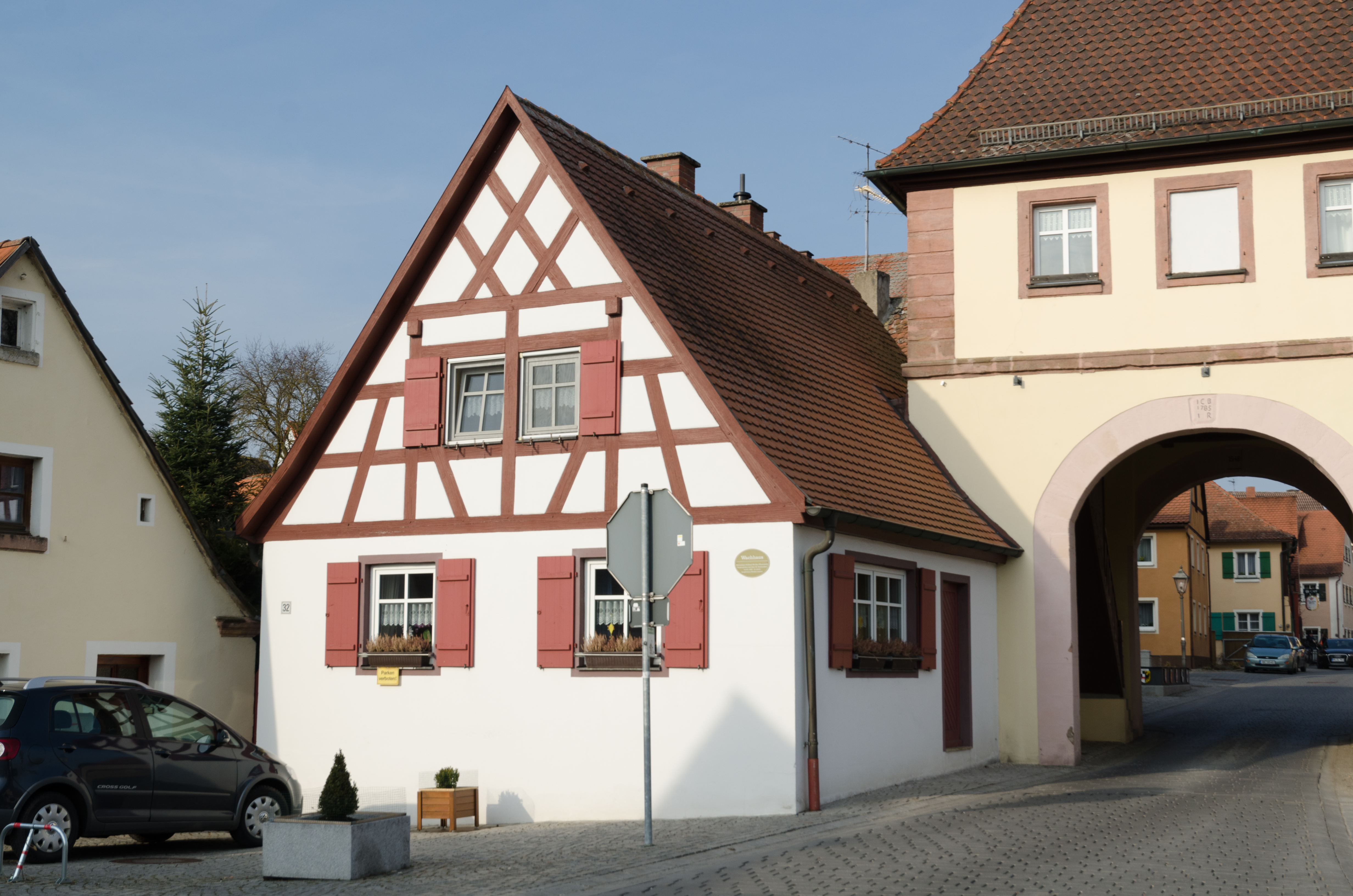 Merkendorf, Hauptstraße 32